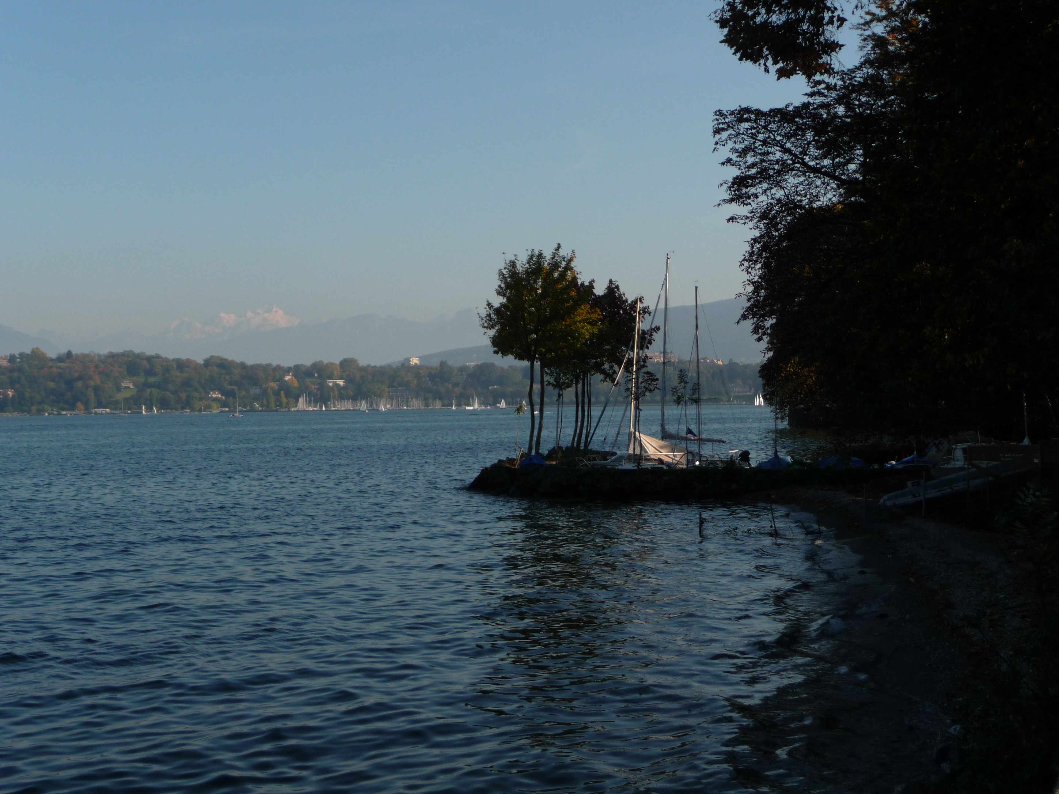 Parc de la Perle du Lac, Geneve